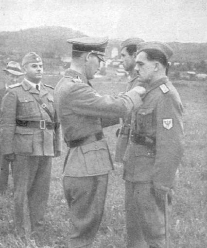 Rosener odlikuje domobranske častnike